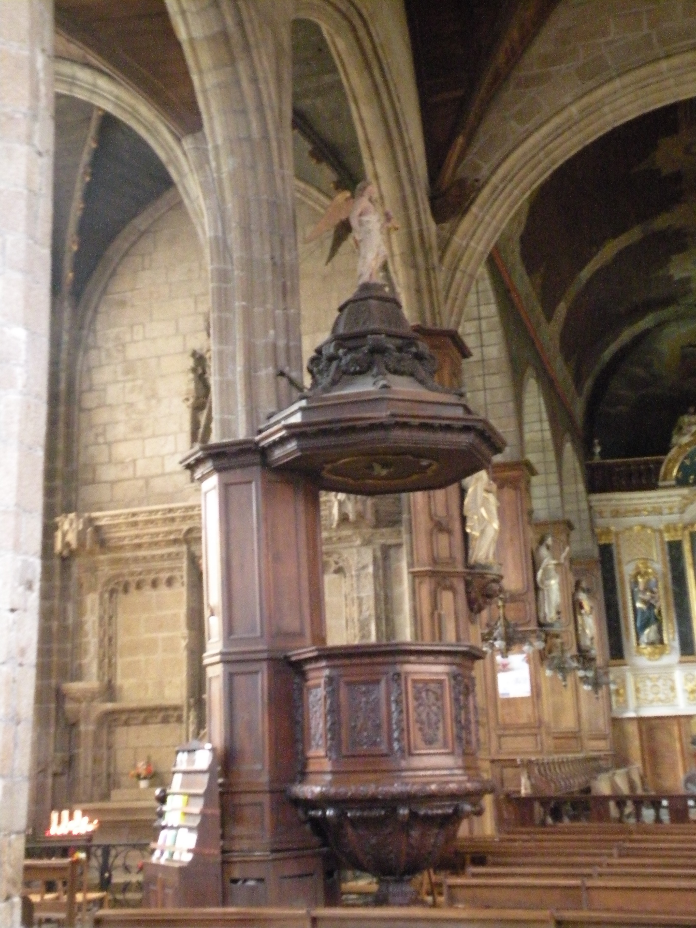 Église Saint-Sulpice de Fougères